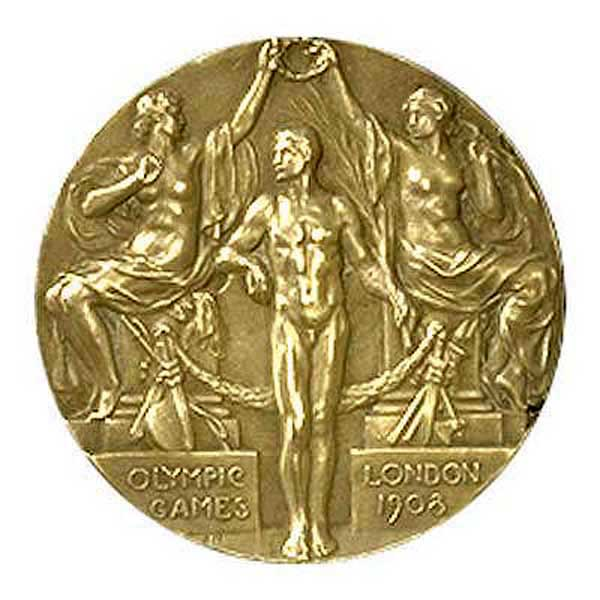 Лицевая сторона медали Игр XXIX Олимпиады (в Лондоне)